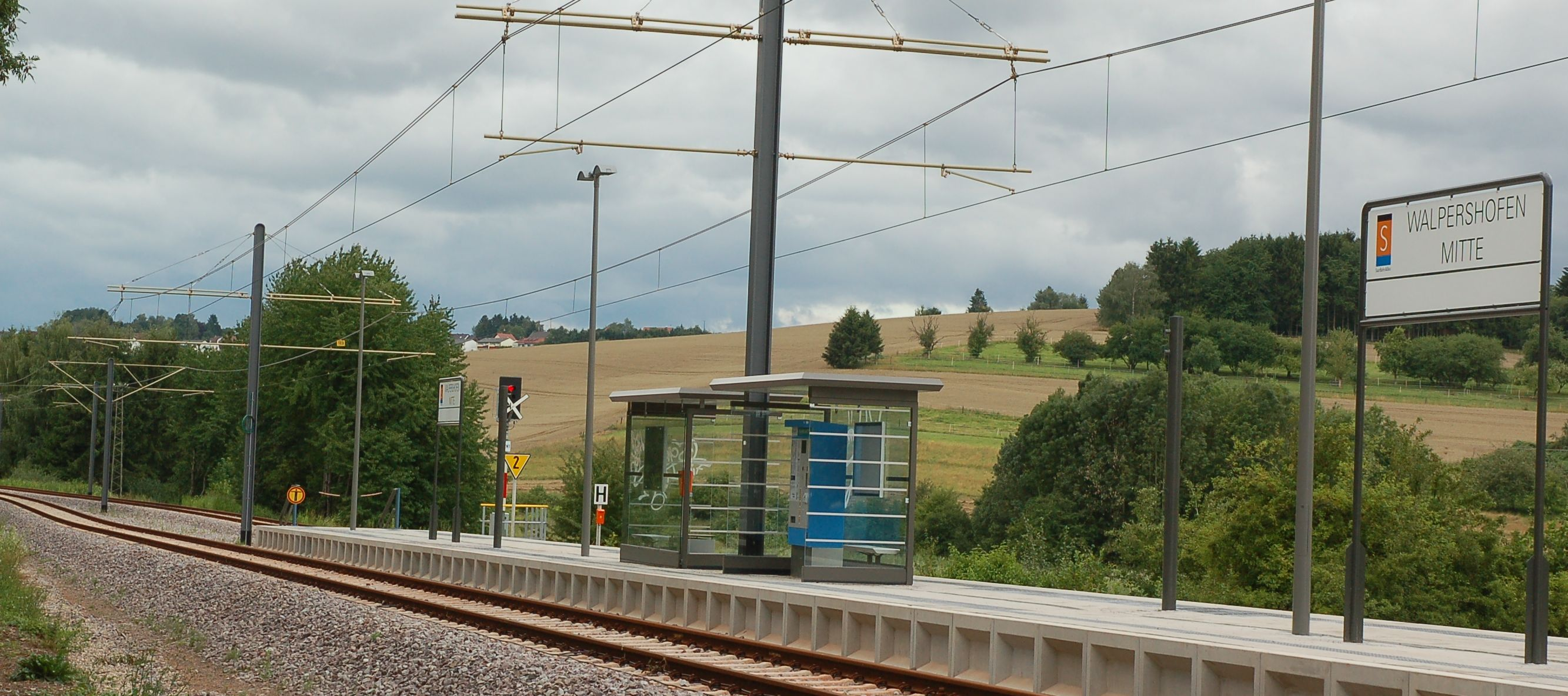 Die neue Saarbahn-Haltestelle „Walpershofen Mitte“ an der Stelle des früheren Walpershofer Bahnhofs. Blickrichtung: Etzenhofen. Ab Herbst 2011 sollen hier die Züge der Saarbahn-Linie 1 halten.